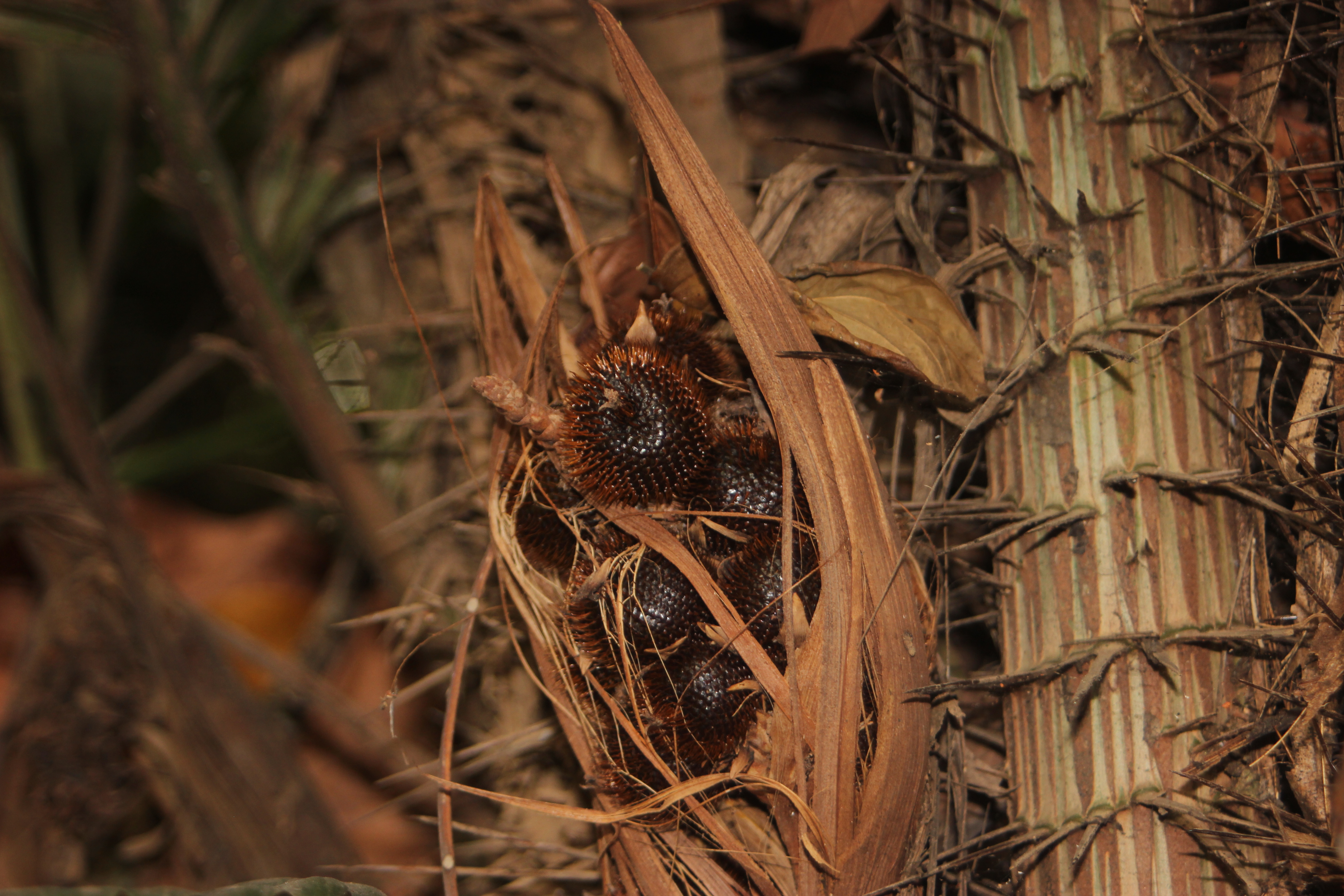 Pada era modern ini, Salak Condet hanya dapat ditemukan di kawasan Cagar Budaya Condet yang mencakup lahan seluas 18.228 hektar, yang meliputi Kelurahan Batu Ampar, Kelurahan Bale Kambang, dan Kelurahan Kampung Tengah. Berkurangnya Ruang Terbuka Hijau (RTH) Jakarta akibat betonisasi, seperti pembangunan gedung-gedung pencakar langit, mall yang megah, pemukiman dan industri menyebabkan habitat Salak Condet (Salacca zalacca) lambat laun semakin hilang. Sekarang Kota Jakarta lebih sering diidentikkan dengan Tugu Monumen Nasional (Monas) atau Ondel-Ondel Betawi bukan dengan Salak Condet atau Elang bondol. Buah tangan atau cinderamata yang dijual di tempat-tempat pariwisata Ibu Kota kebanyakan bergambar atau berbentuk Tugu Monas atau Ondel-Ondel, jarang yang bergambar Salak Condet atau Elang bondol bahkan tidak ada. Hal itu pertanda masyarakat tidak tahu bahwa maskot Jakarta adalah Salak Condet dan Elang bondol. Harapannya, pemerintah provinsi DKI Jakarta lebih memperhatikan identitas-identitas Ibu Kota seperti Salak Condet yang sudah mulai dilupakan masyarakat Ibu Kota agar tidak punah di tanahnya sendiri di kota Jakarta, semoga generasi mendatang tidak hanya dapat melihat Salak Condet berupa patung batu yang sedih tidak berbicara.